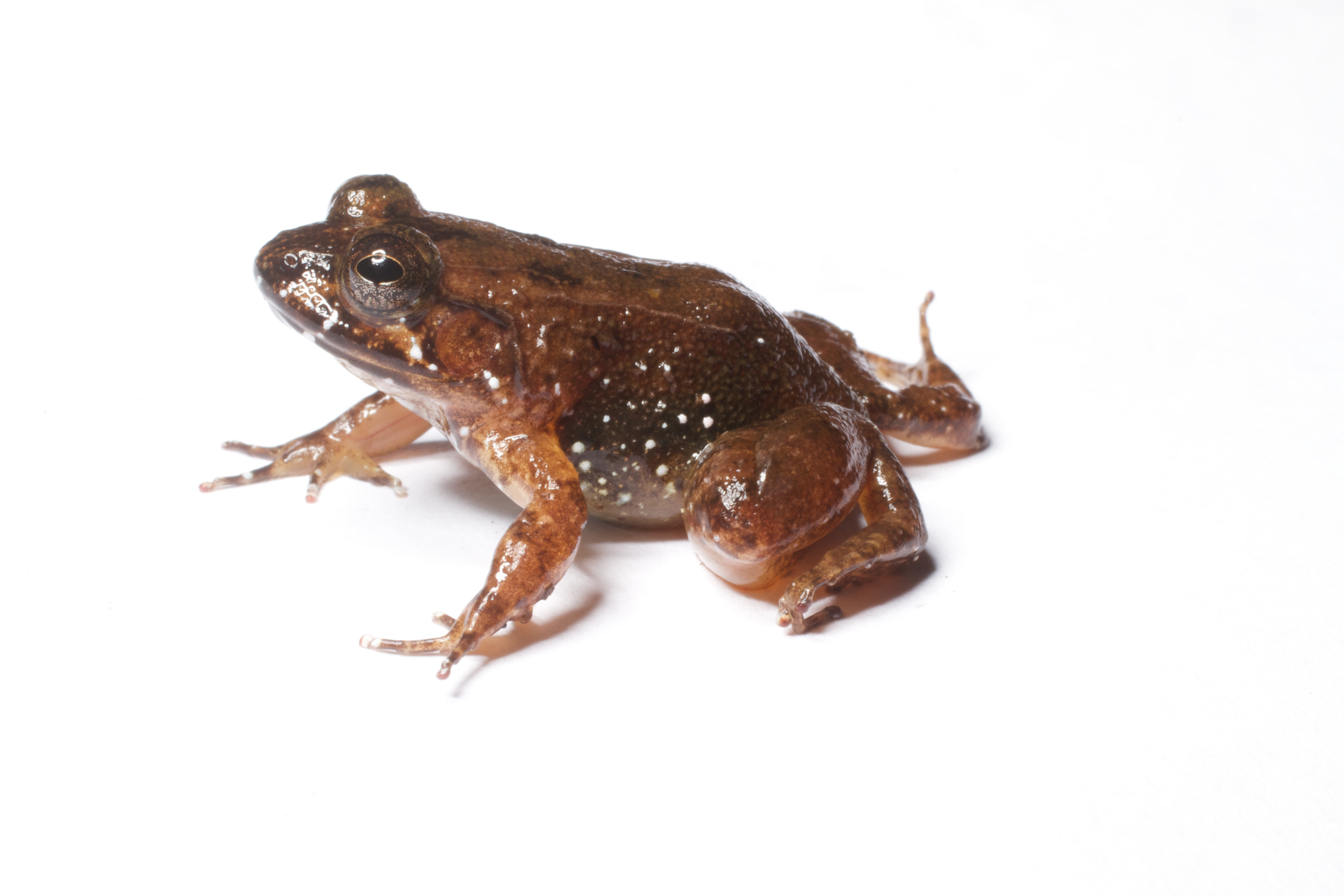 Mantidactylus biporus